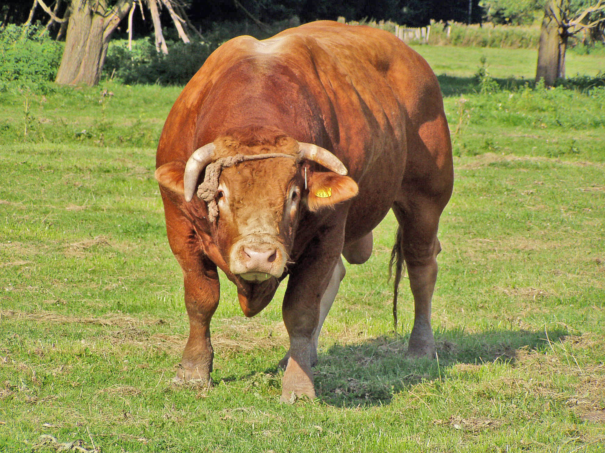 Bull, Oostvaardersplassen, the Netherlands.